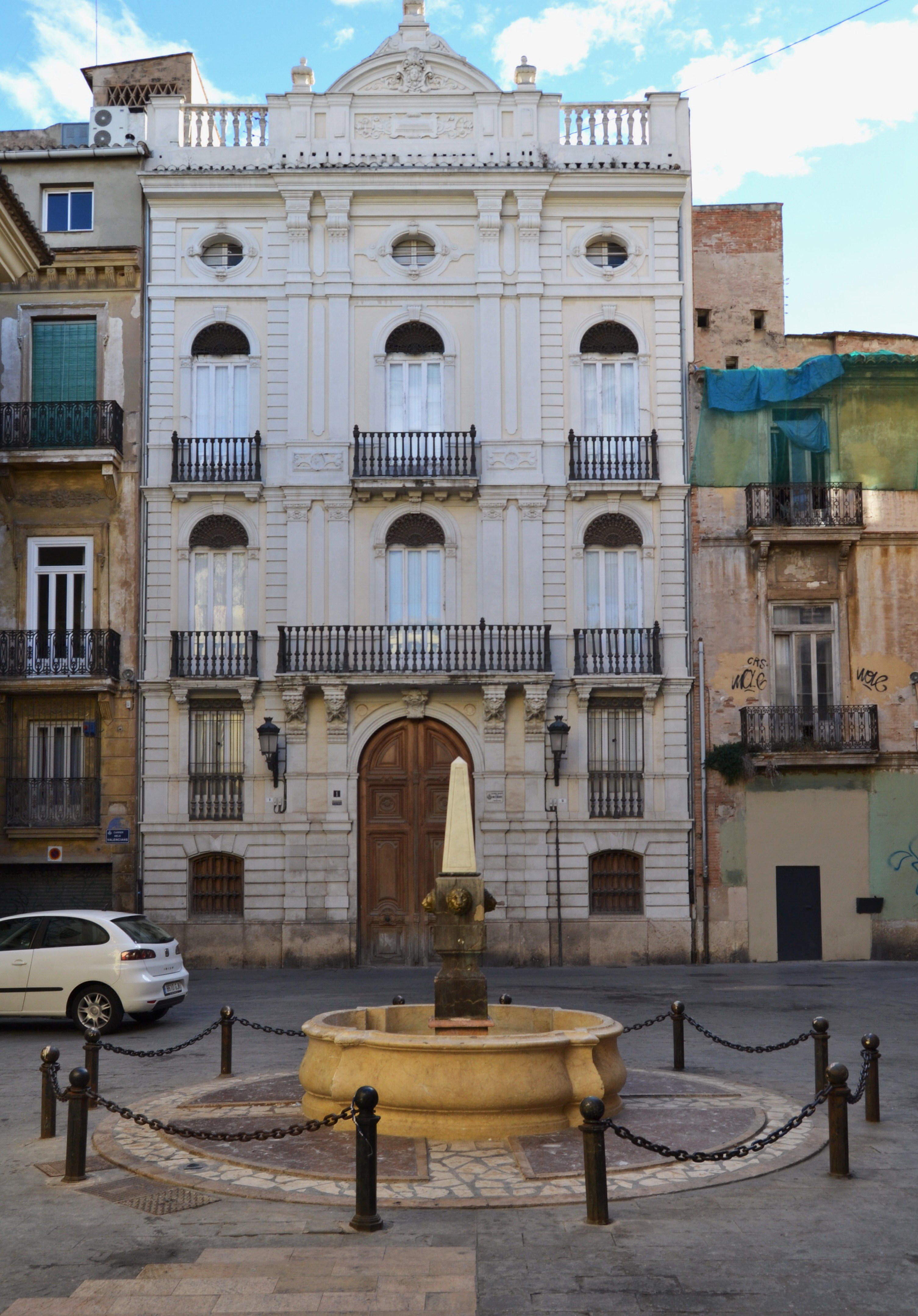 Plaça del Correu Vell - València.